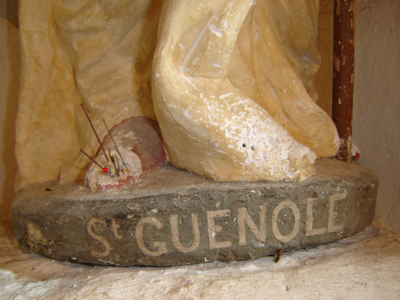 Les pieds de la statue de Saint Guénolé à la chapelle de Prigny. Les jeunes filles y plantent des épingles pour trouver l'âme soeur... Auteur: Emmanuel Manproc Prochasson Réalisée lors de la Wikiparty du 30 Avril au Moutiers en Retz